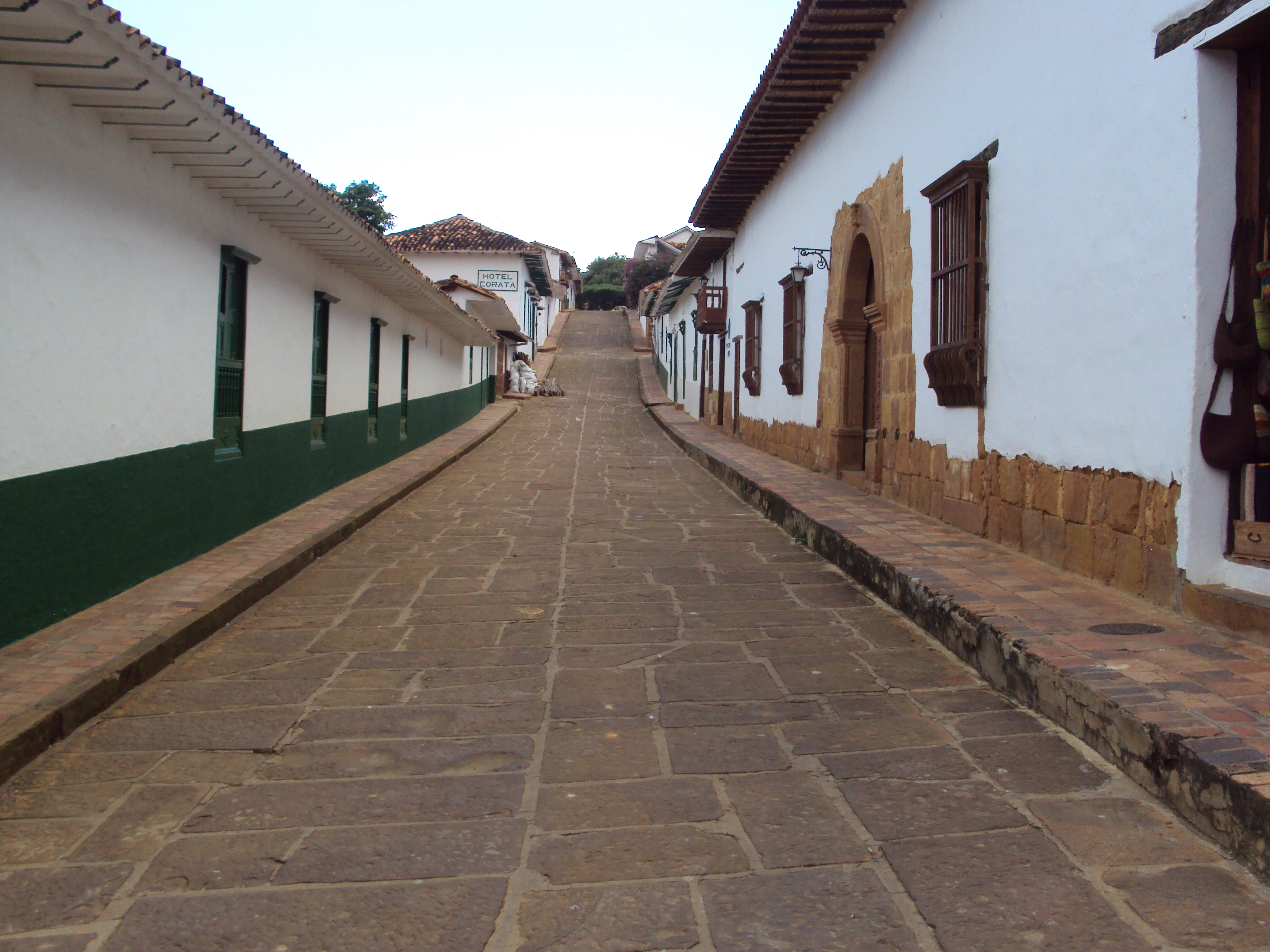 Sector Antiguo del Municipio de Barichara